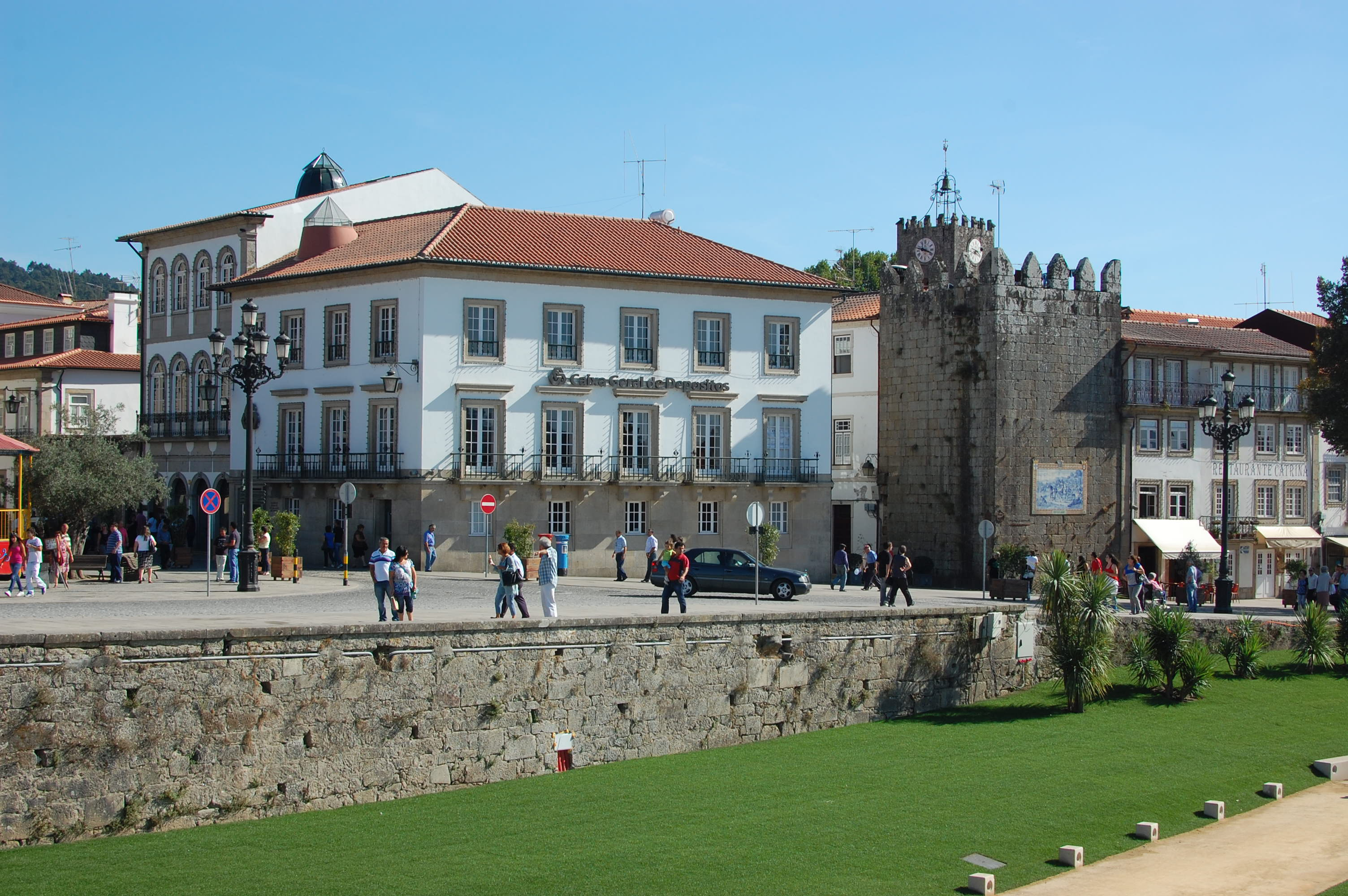 Torre de São Paulo, freguesia de Ponte de Lima, vila e concelho de mesmo nome, distrito de Viana do Castelo, Portugal.